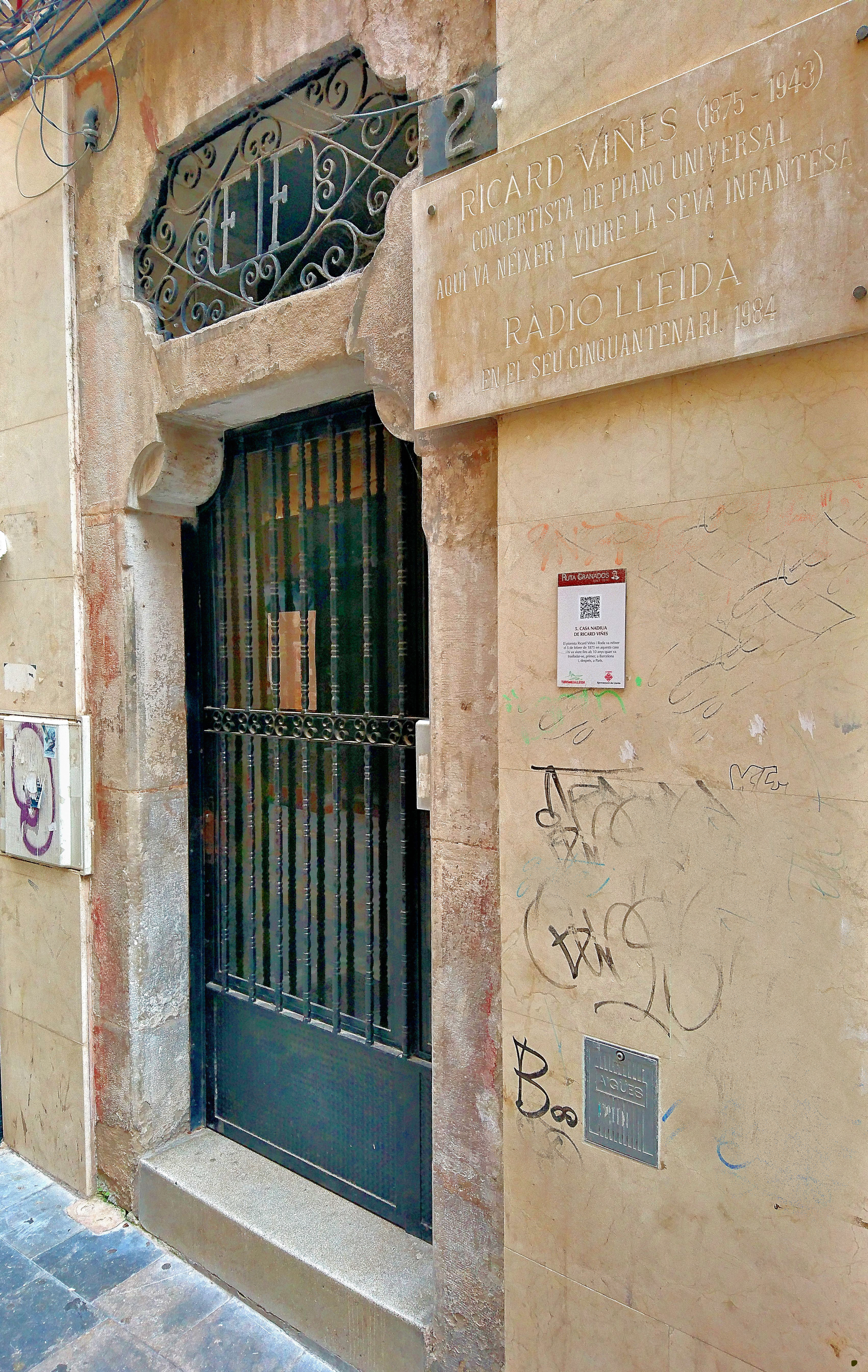 Casa natal del compositor y pianista Ricardo Viñes.